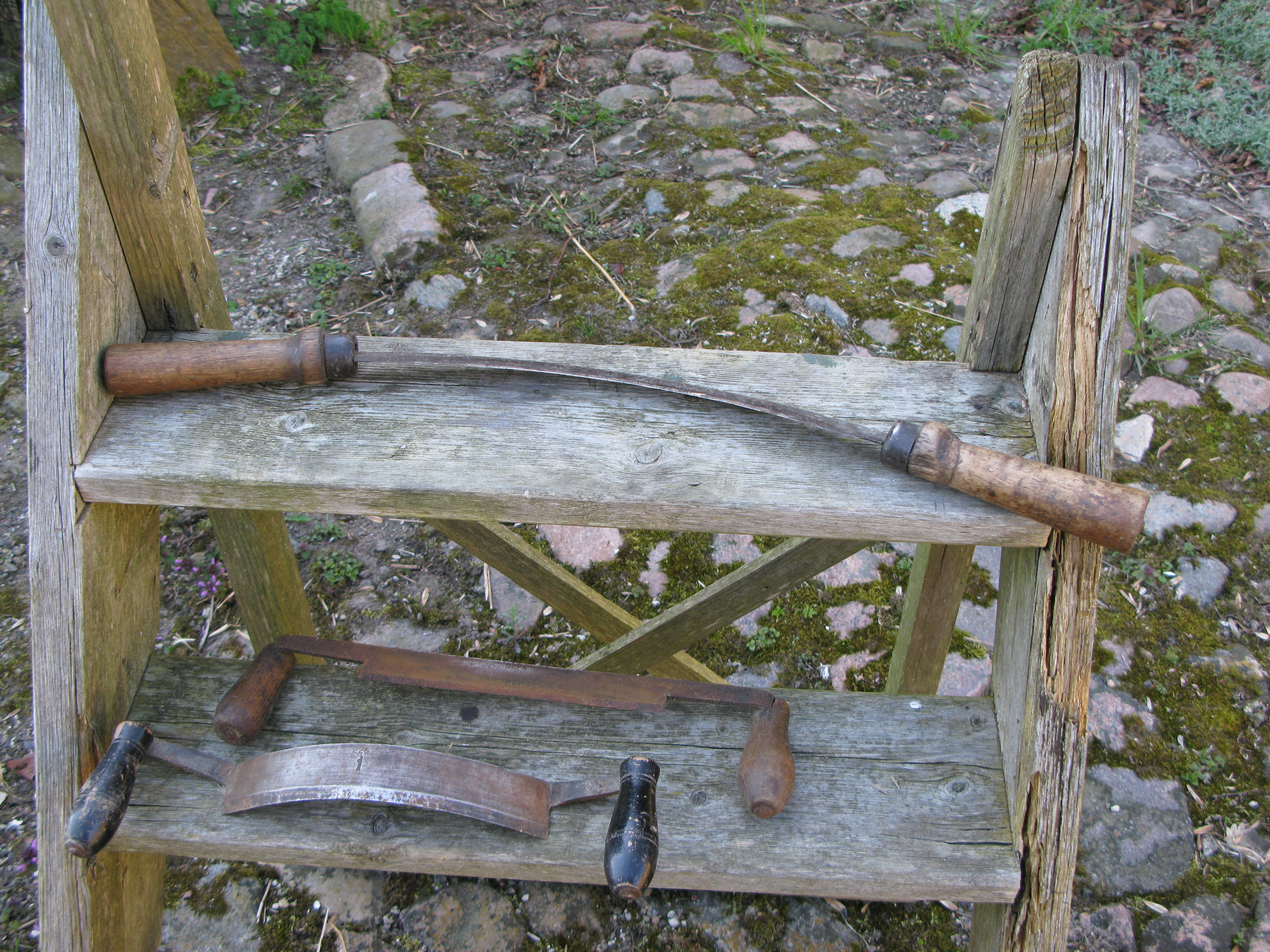 Båndkniv af finsk oprindelse set hos tømrer Kuntze i Snesere, Sjælland.